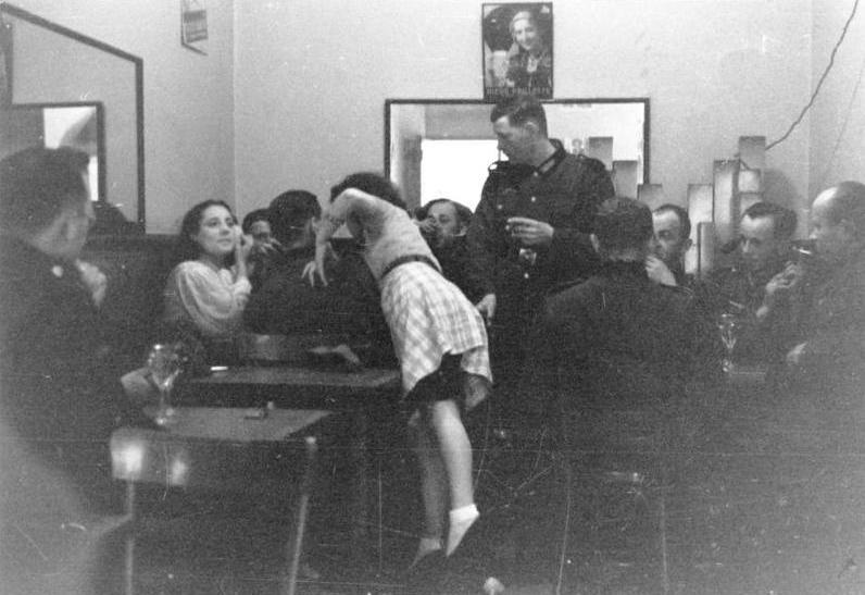 Překlad nápisu: Otevřeno od 10 hodin do 21 hodin. Každý německý voják musí k 21. hodině opustit podnik. Velitel